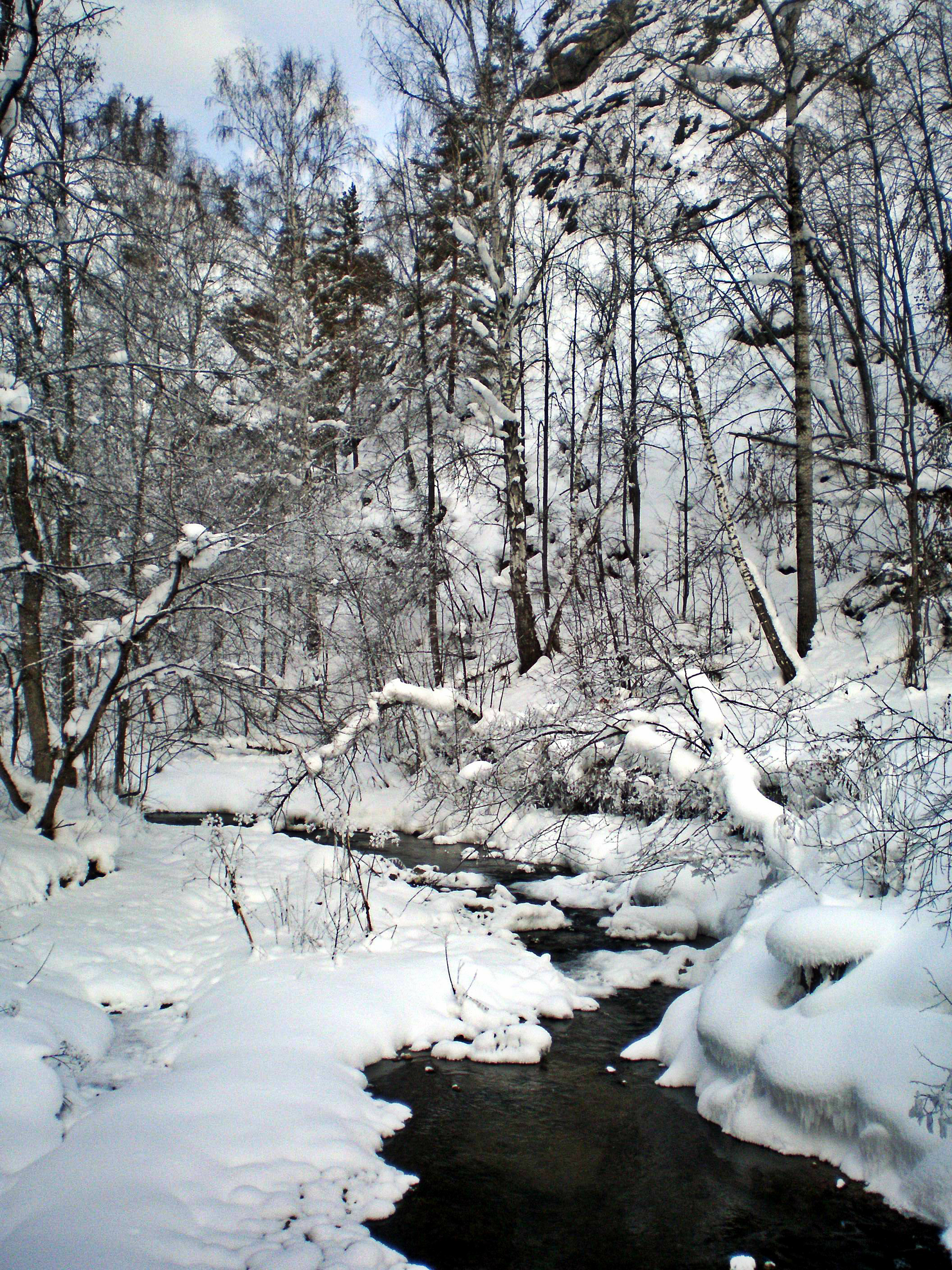 Шульган-Таш заповедник, Бурзянский район This image is related to the protected area of Russia number 0200105